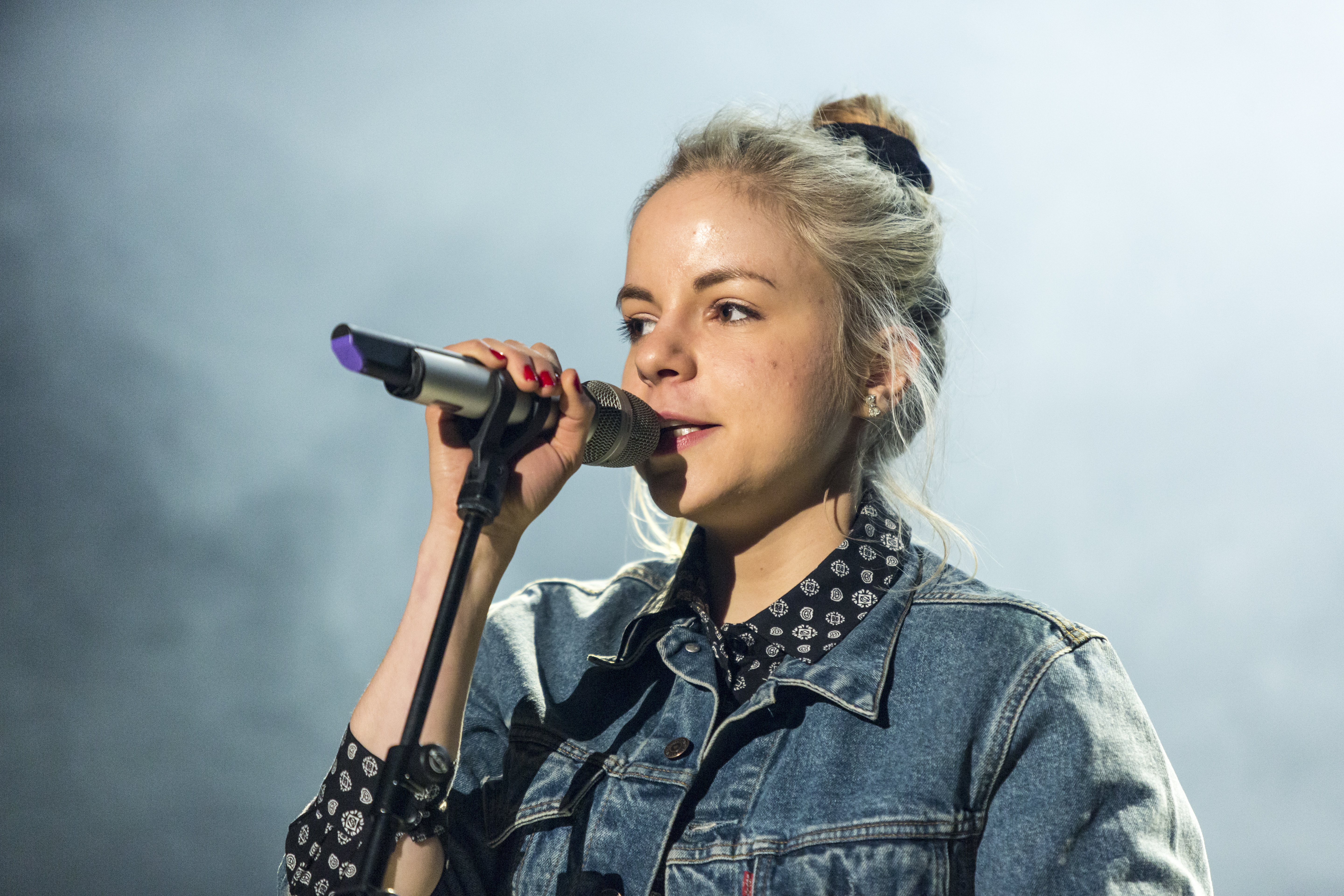 Die deutsche Schauspielerin und Poetry-Slammerin Julia Engelmann slammt beim Konzert von Tim Bendzko in der Jahrhunderthalle Frankfurt.